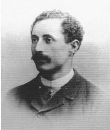 French astronomer Pierre Puiseux (1855-1928)